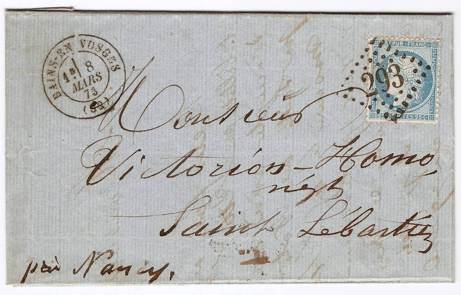 Lettre de France (Bains les Vosges), affranchie avec un 25 c. bleu Céres de 1871 et affranchi avec un cachet gros chiffre 293